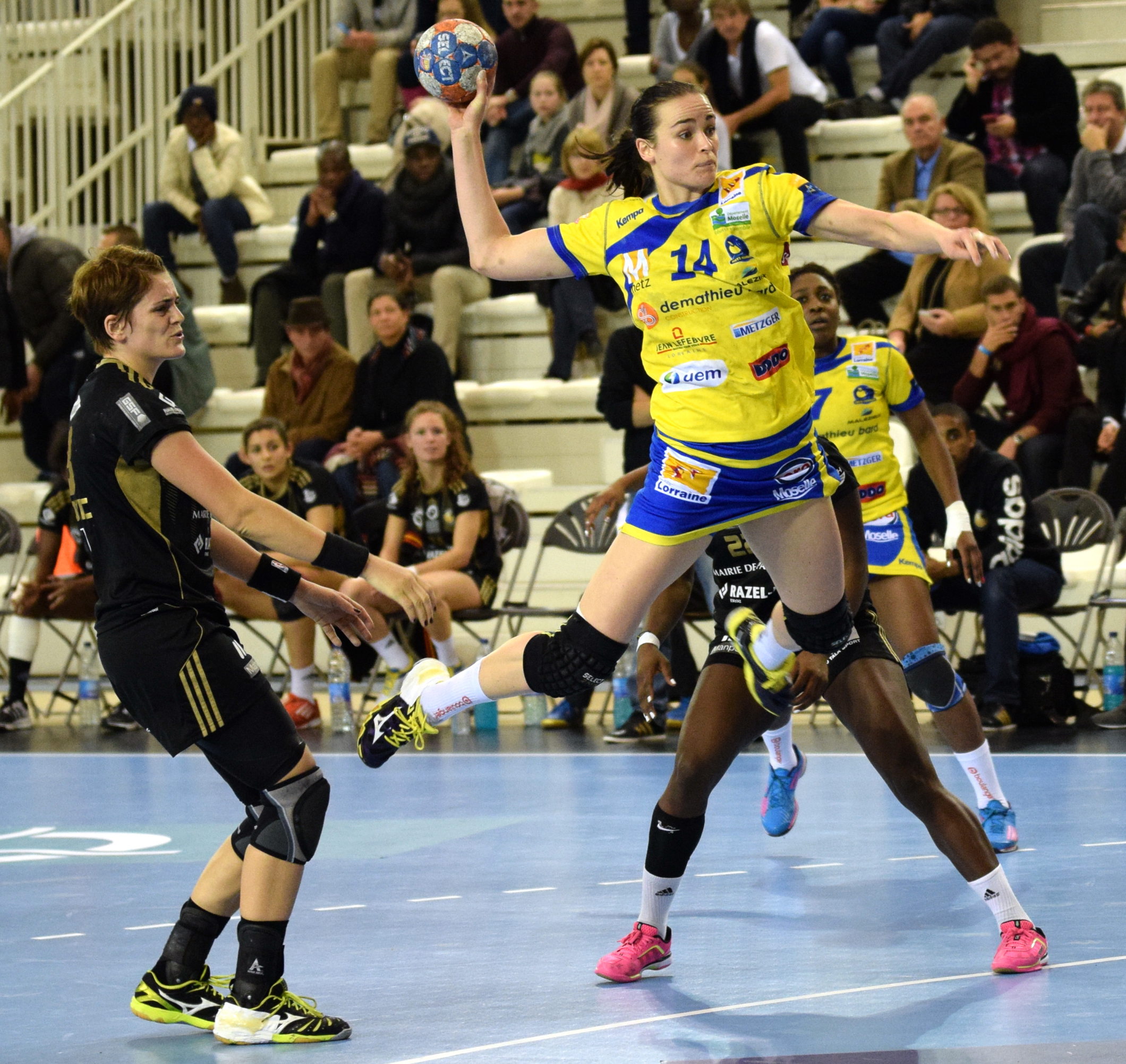 Yvette Broch , lors de la rencontre de la 10e journée en Issy Paris Hand et Metz Handball, le 12 novembre 2014. Au stade Robert Carpentier à Issy les moulineaux.